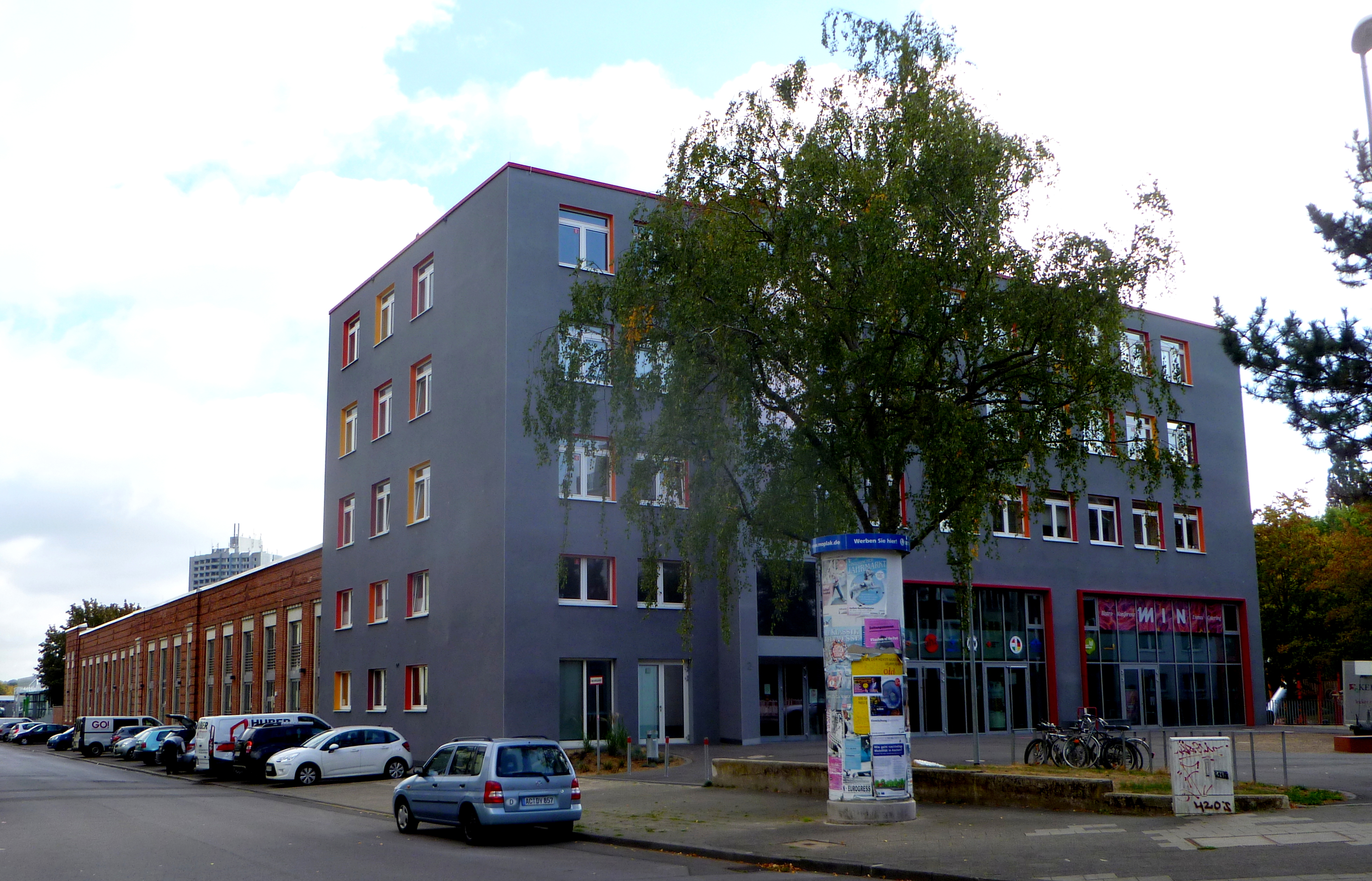 ehemaliges Straßenbahndepot Talstraße